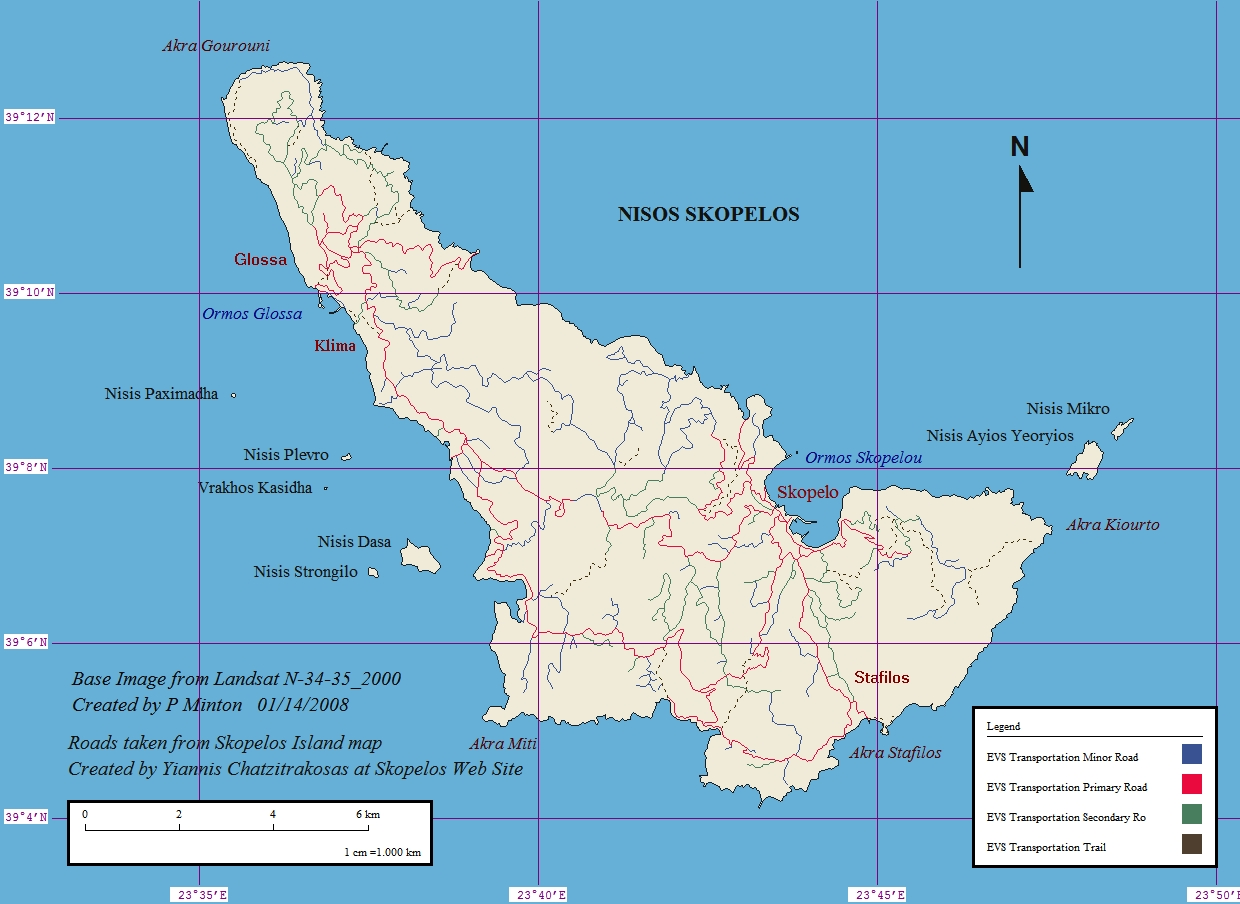 Nisos Skopelos, Sporades Islands, Greece